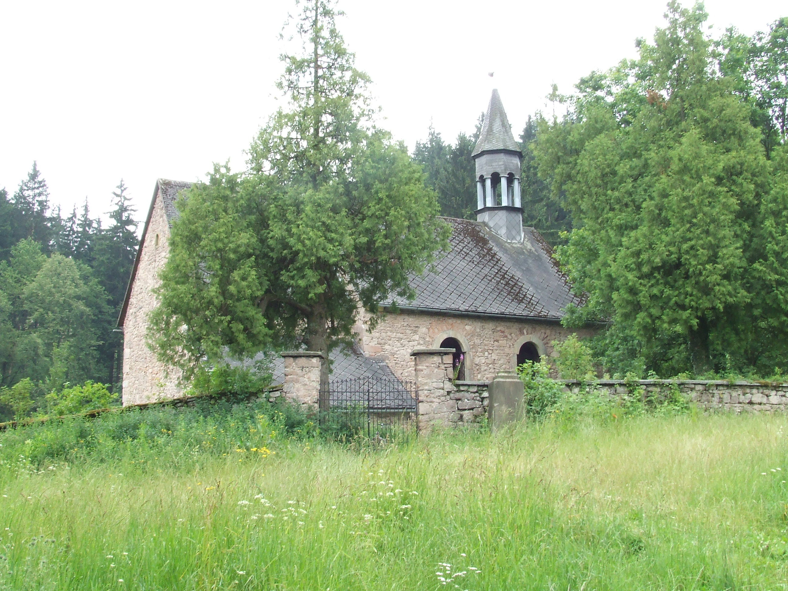 Ruine St.Michaels Kirche bei Okrzesyn